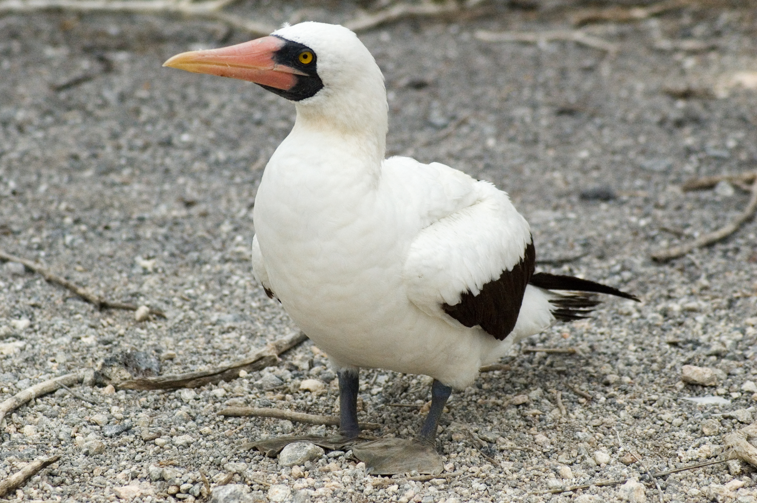 Nazca booby